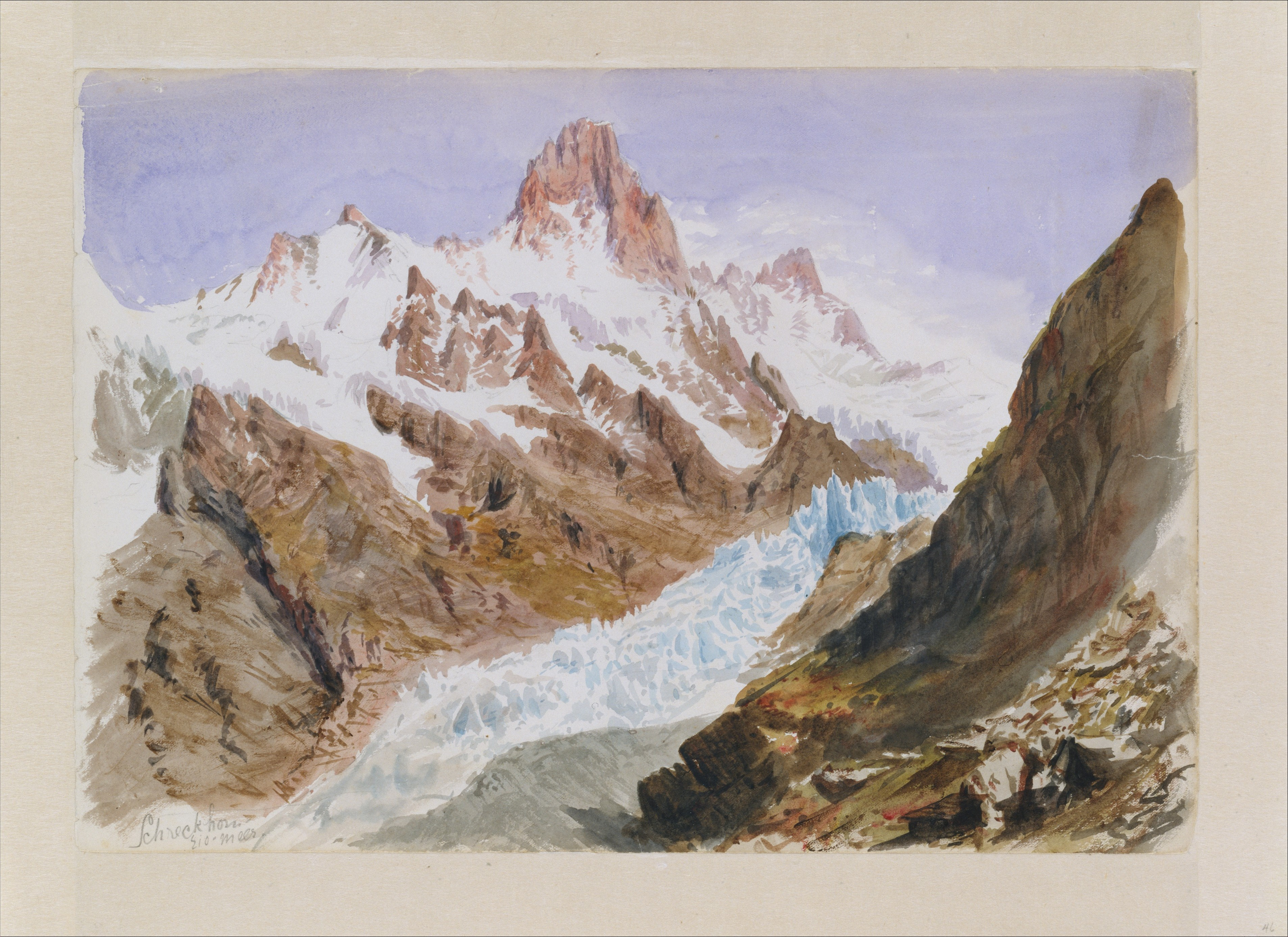 Sketchbook; Drawings